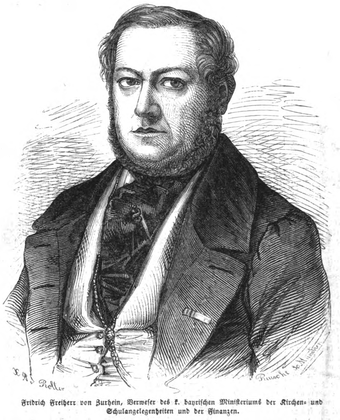 Friedrich Carl Freiherr von Zu Rhein, bayerischer Minister, 1847.